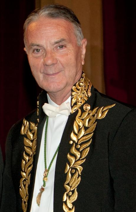 Retrato del Dr. Ramón Poch Torres